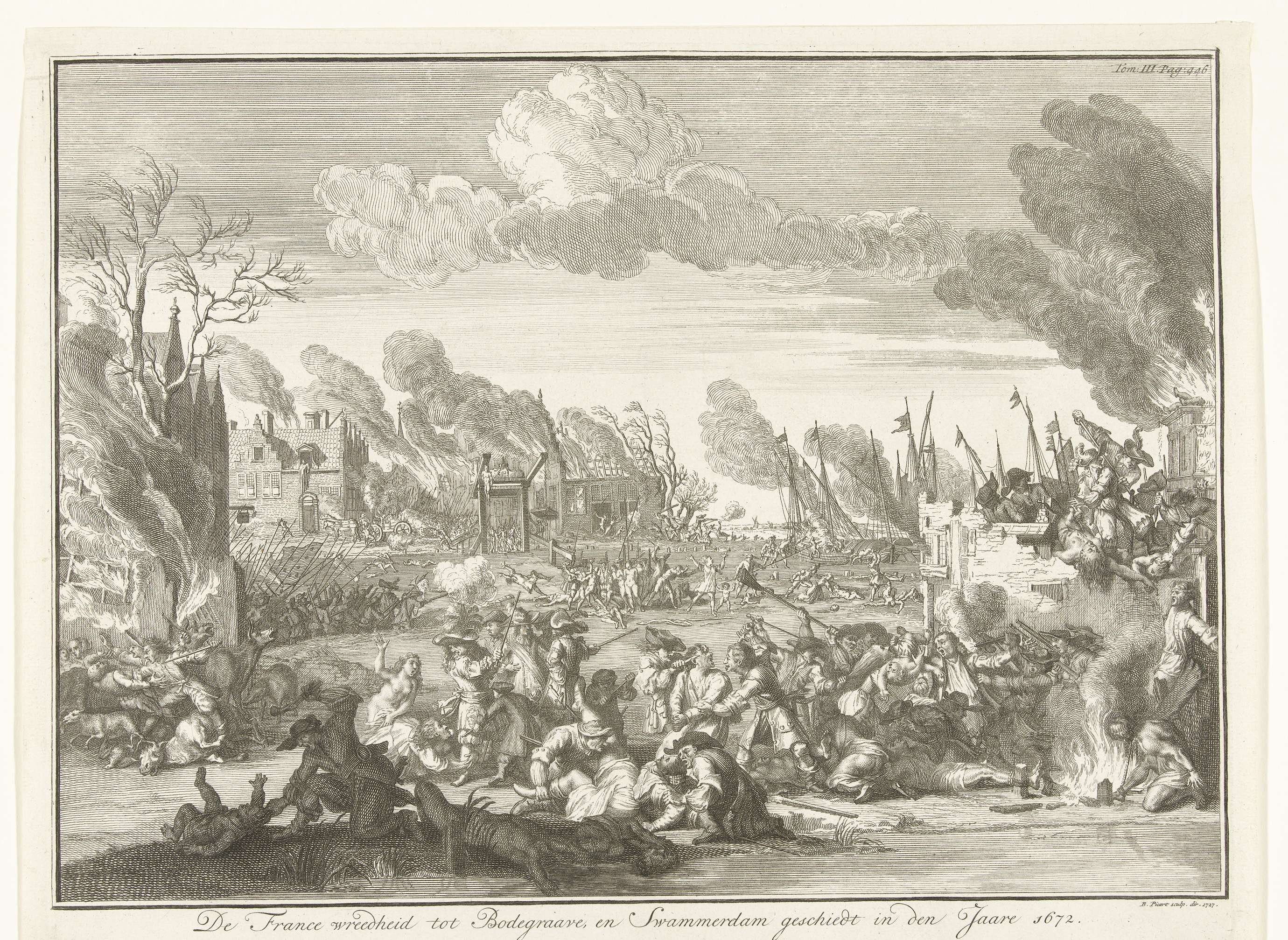 Massacre de Bodegraven par les français, durant la guerre de Hollande.